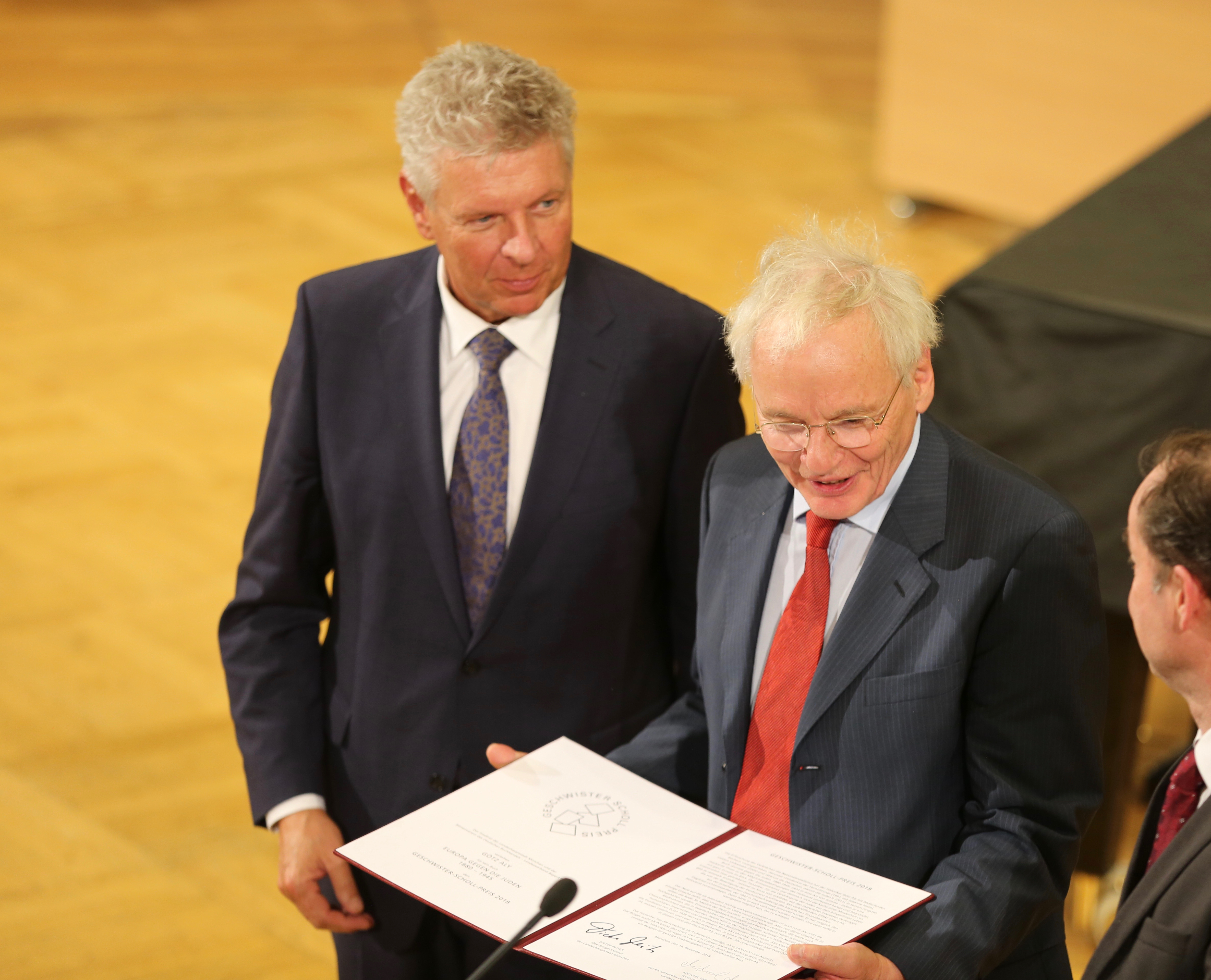 Verleihung des Geschwister-Scholl-Preises 2018 an Götz Aly in der Großen Aula der LMU. Von links: Münchens Oberbürgermeister Dieter Reiter, Götz Aly, Michael Then, Vorsitzender des Börsenvereins des Deutschen Buchhandels - Landesverband Bayern.